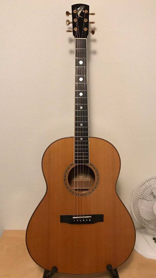 Ett exempel på en Larrivee-gitarr